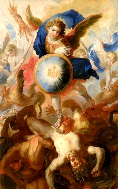 Altarbild